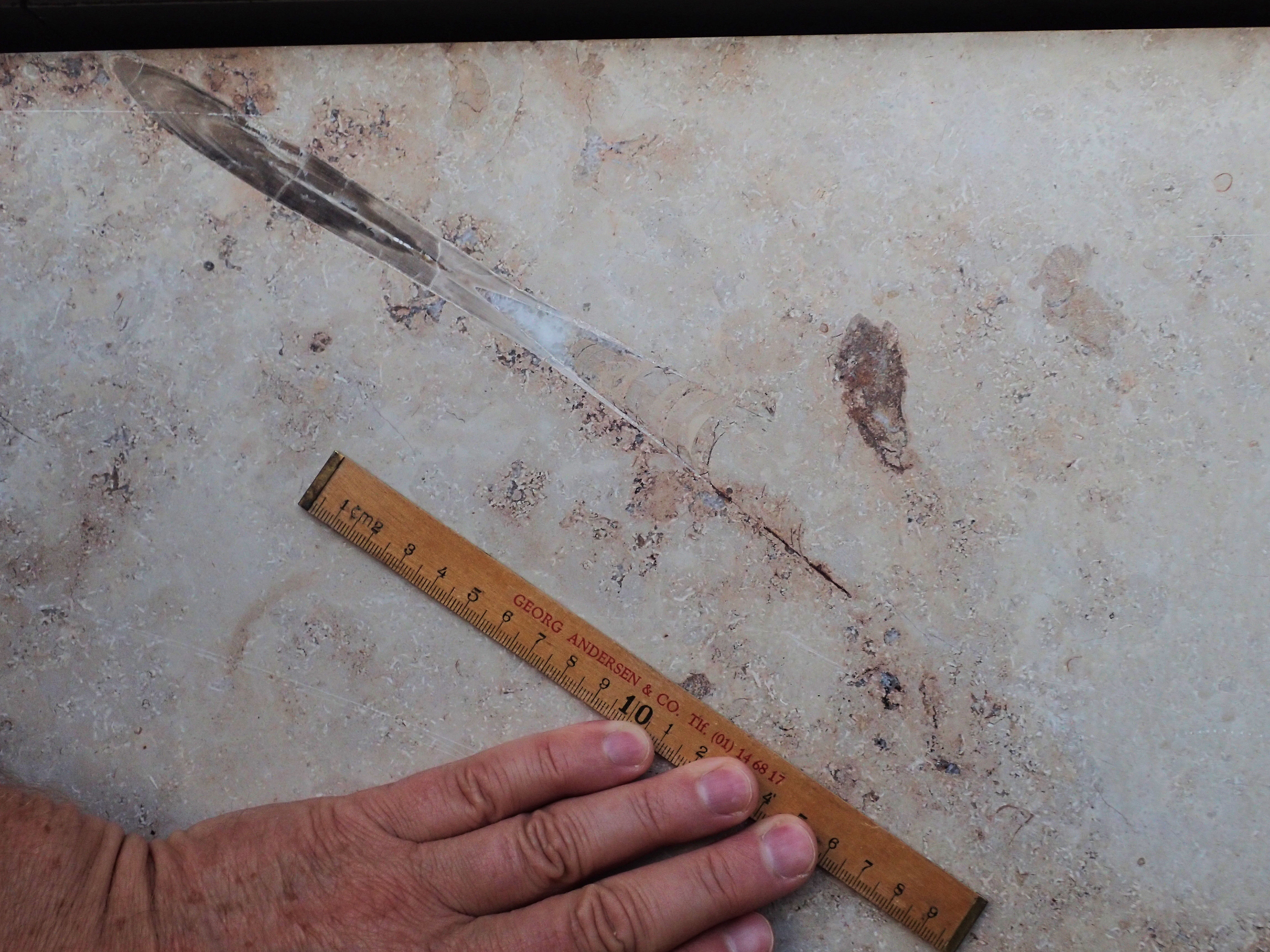 Meget velbevaret belemnit i 'Gelb Jura' facadesten på Operaen i København